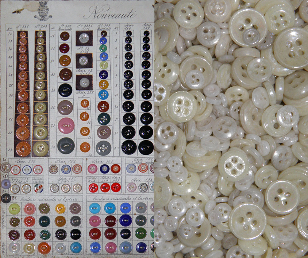 Carte échantillons et Boutons en émaux de Briare, vers 1850